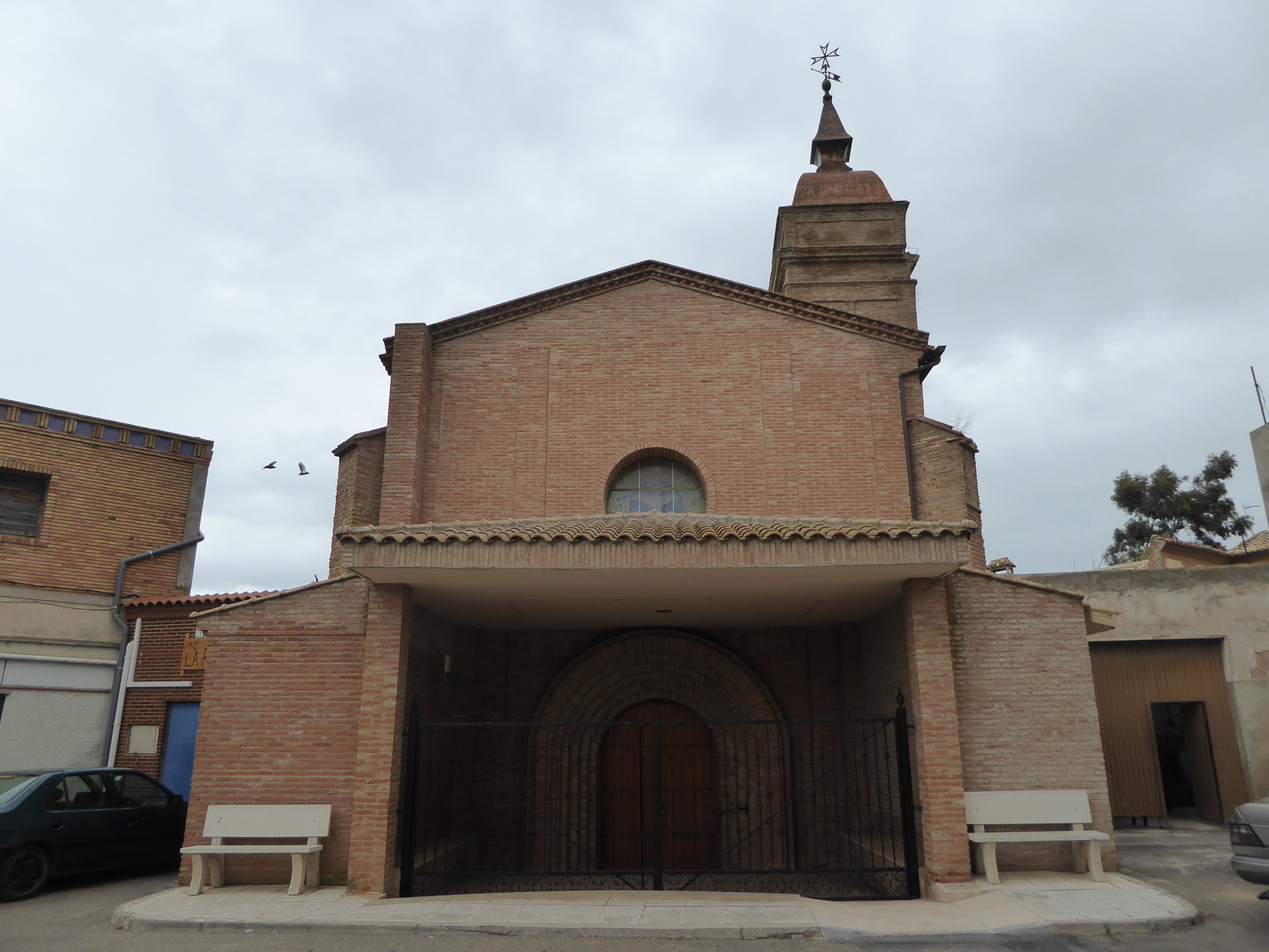 Grisén